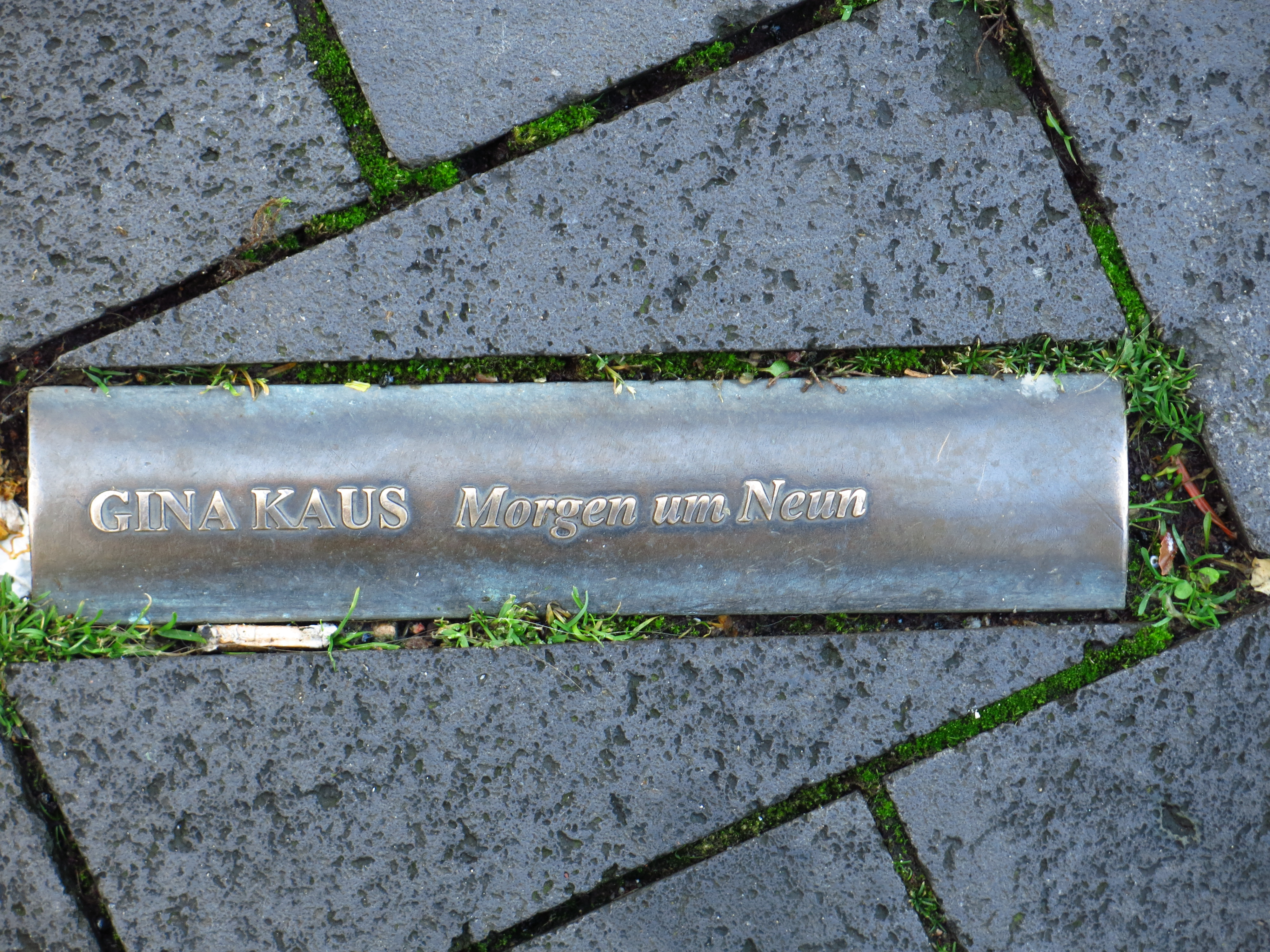 Das Mahnmal zur Bücherverbrennung auf dem Bonner Markt; In das Pflaster des Bonner Markt sind insgesamt 60 sichtbare Buchrücken, sogenannte „Lesezeichen“, verteilt, die sich an der Rathaustreppe, dem Ort an dem die Bücher am 10. Mai 1933 verbrannt wurden, verdichten. Zusätzlich wurde ein wetterfester Archiv-Behälter in Form einer Büchertruhe in den Platz eingelassen. Seine Inschrift benennt das Ereignis und weitere Autoren von verbrannten Büchern.